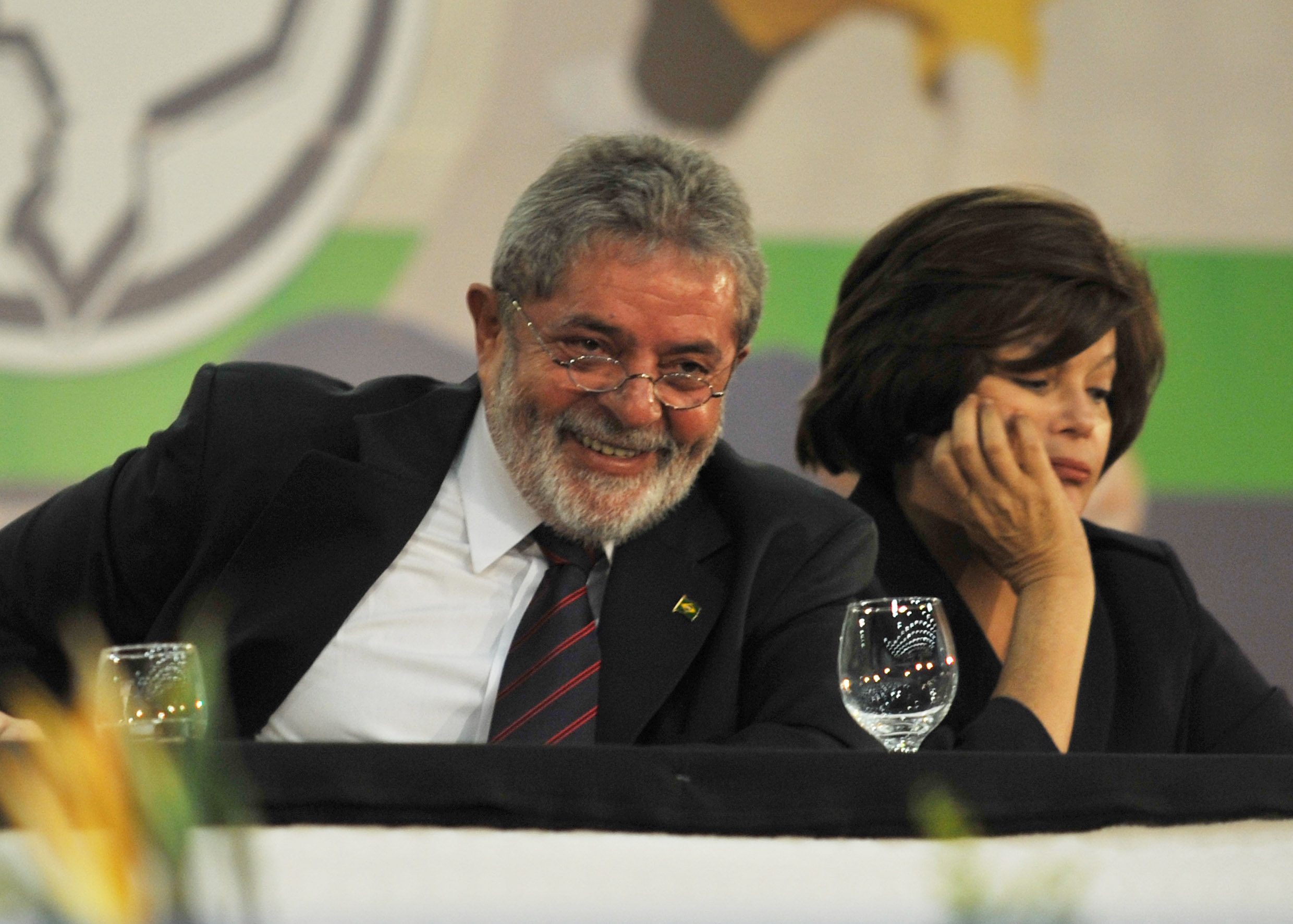 O presidente Luiz Inácio Lula da Silva e a ministra Dilma Rousseff, chefe da Casa Civil, no 51º Congresso da UNE (Conune), organizado pela União Nacional dos Estudantes.